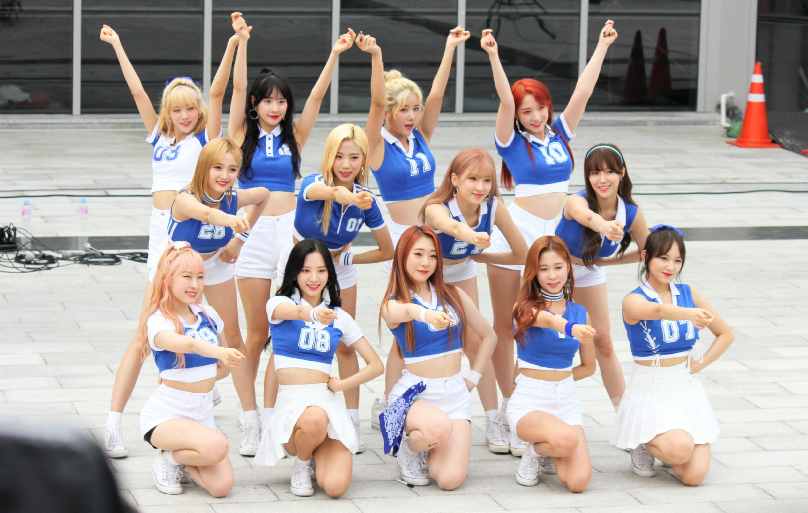 170716 수서역 게릴라